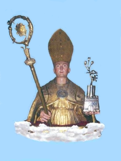 Immagine del busto di san costabile gentilcore, patrono e fondatore di Castellabate